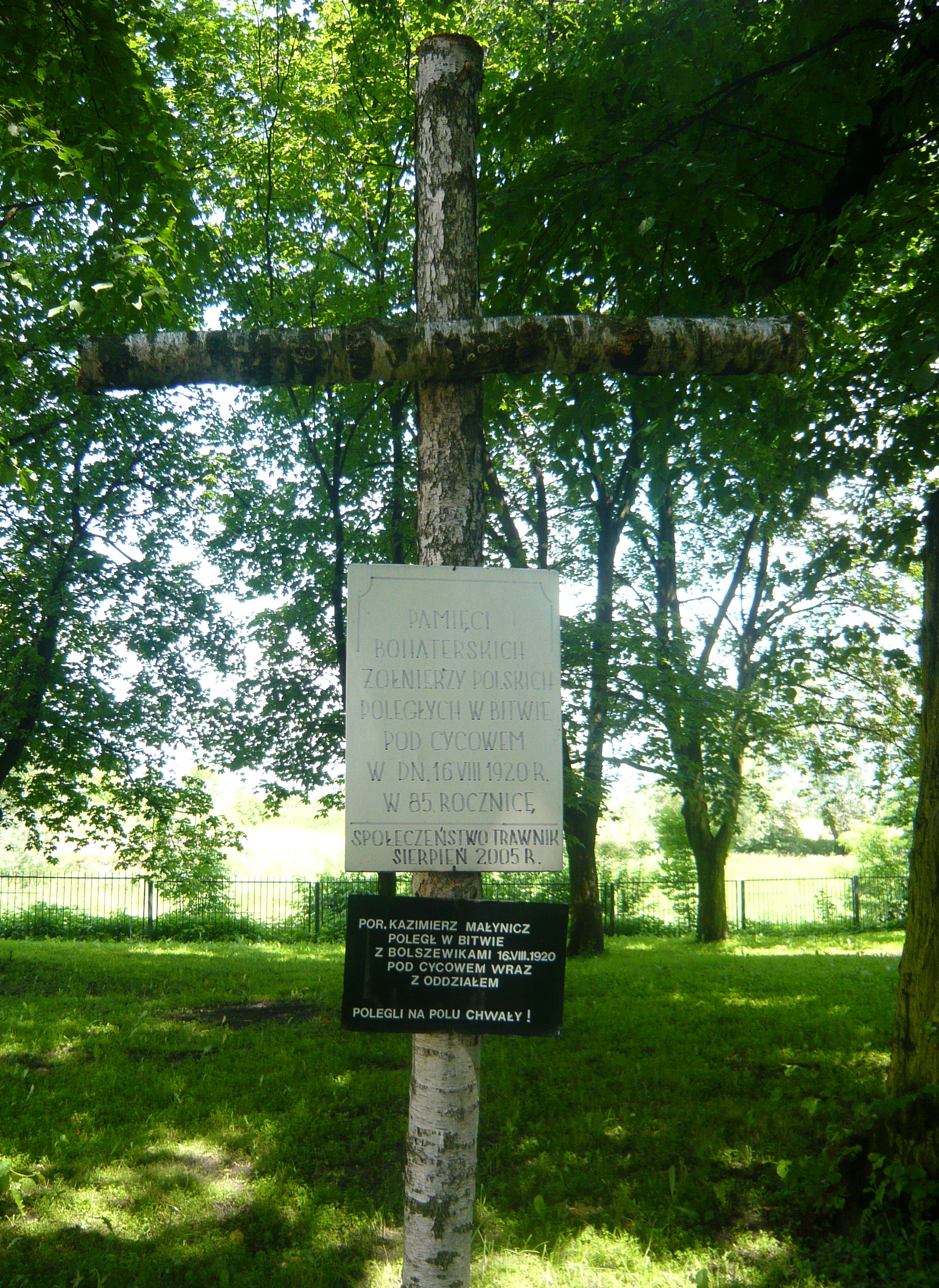 Cmentarz wojenny Trawniki